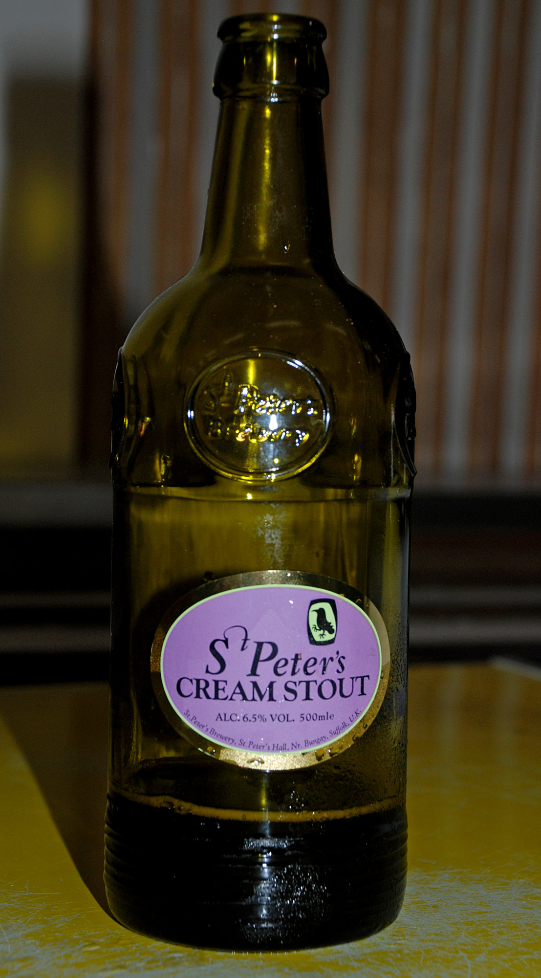 St.Peter's Cream Stout, UK